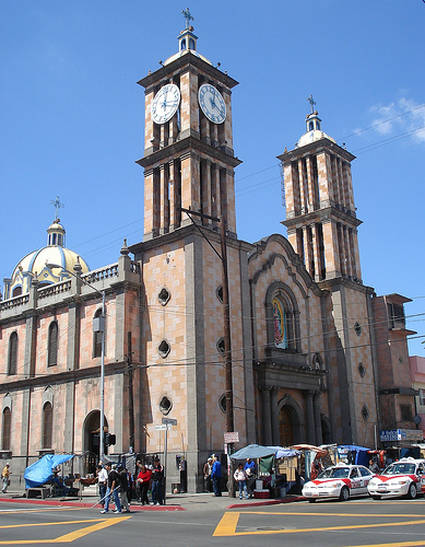 Catedral de Nuestra Señora de Guadalupe